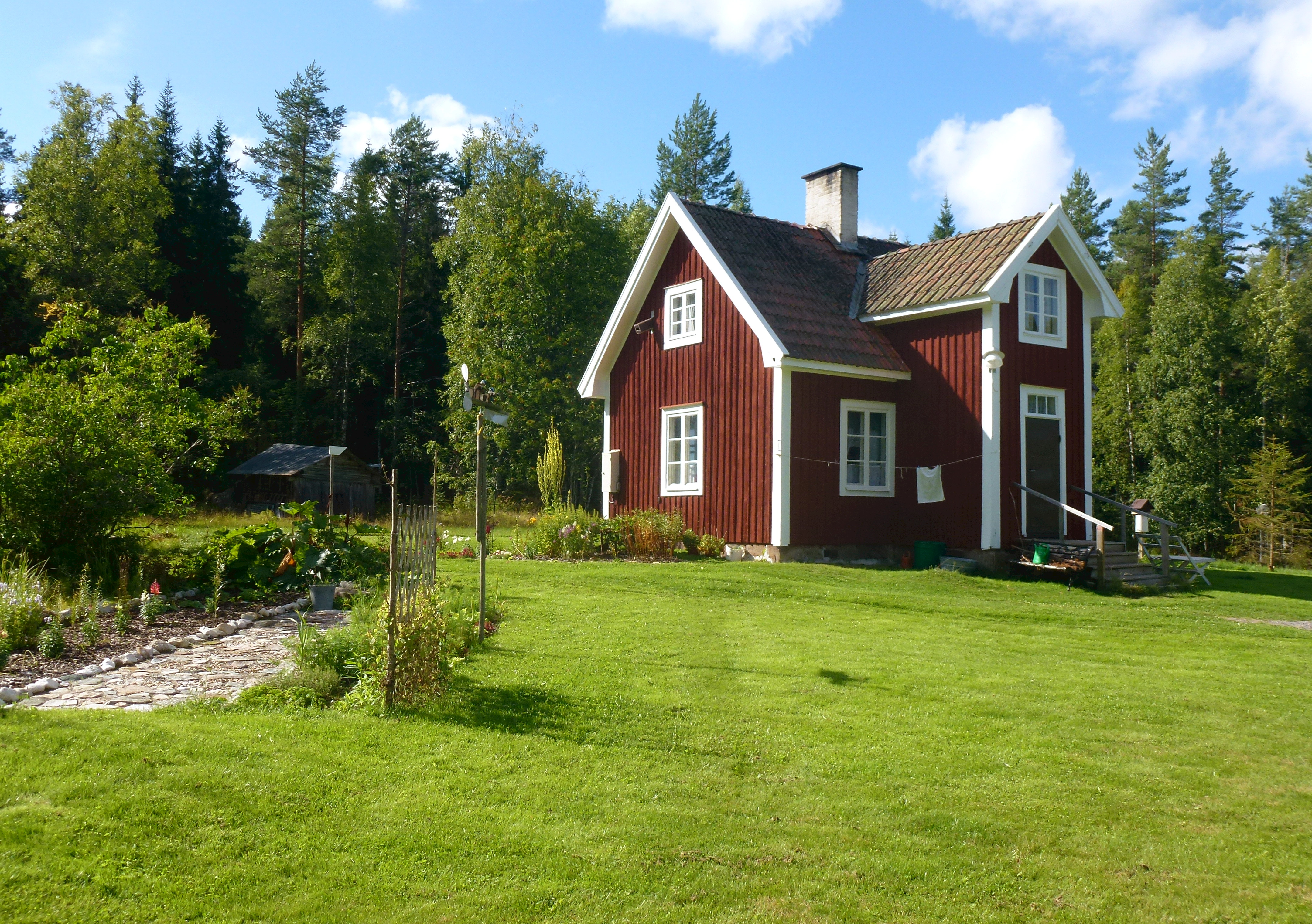 Kestina